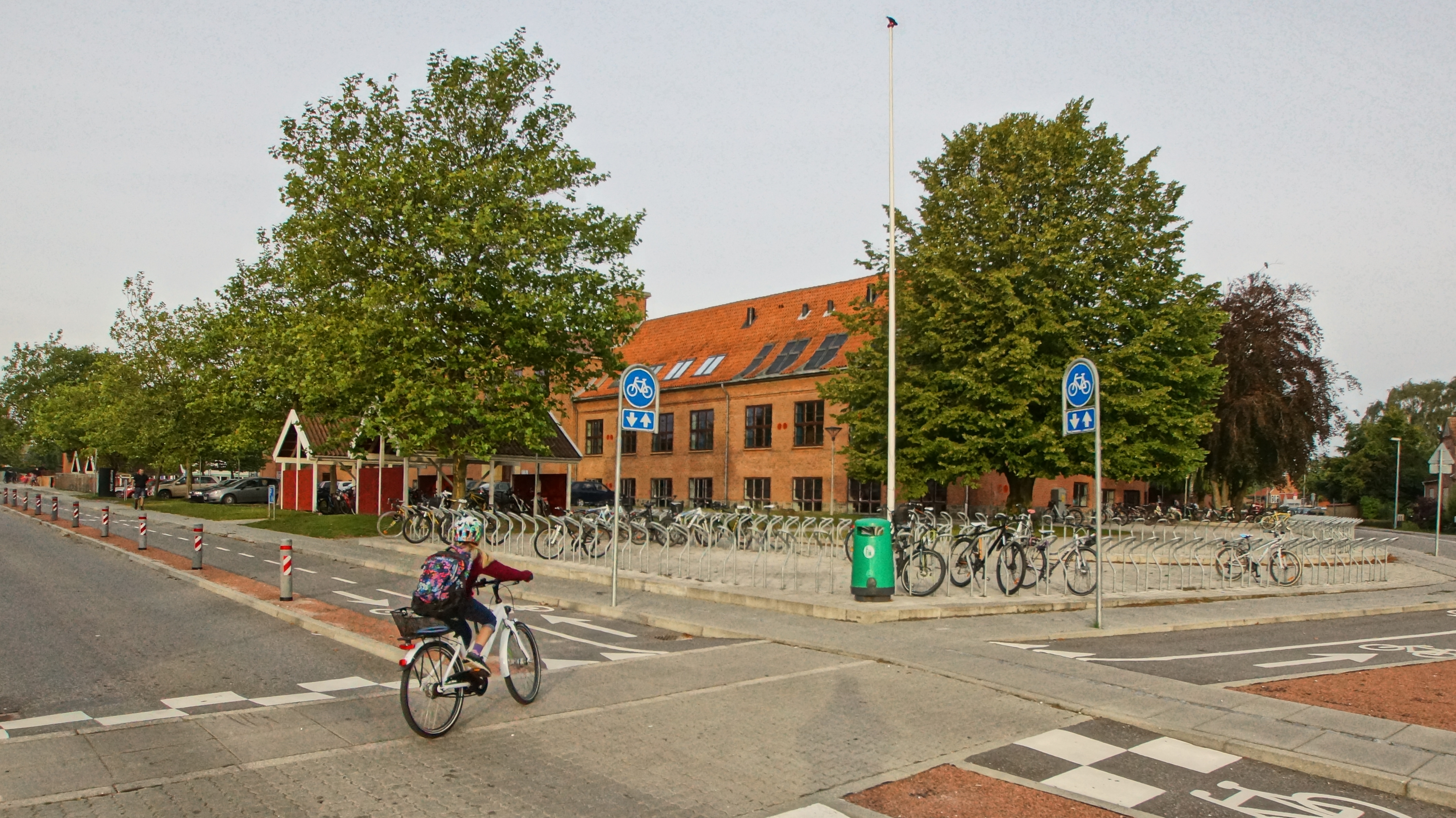 Hornslet Skole, 10.09.15